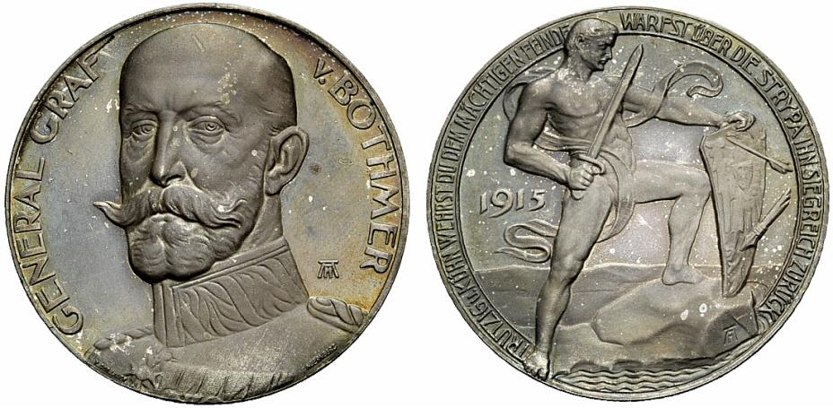 Die Erinnerungsmünze für die Erstürmung des Zwinin